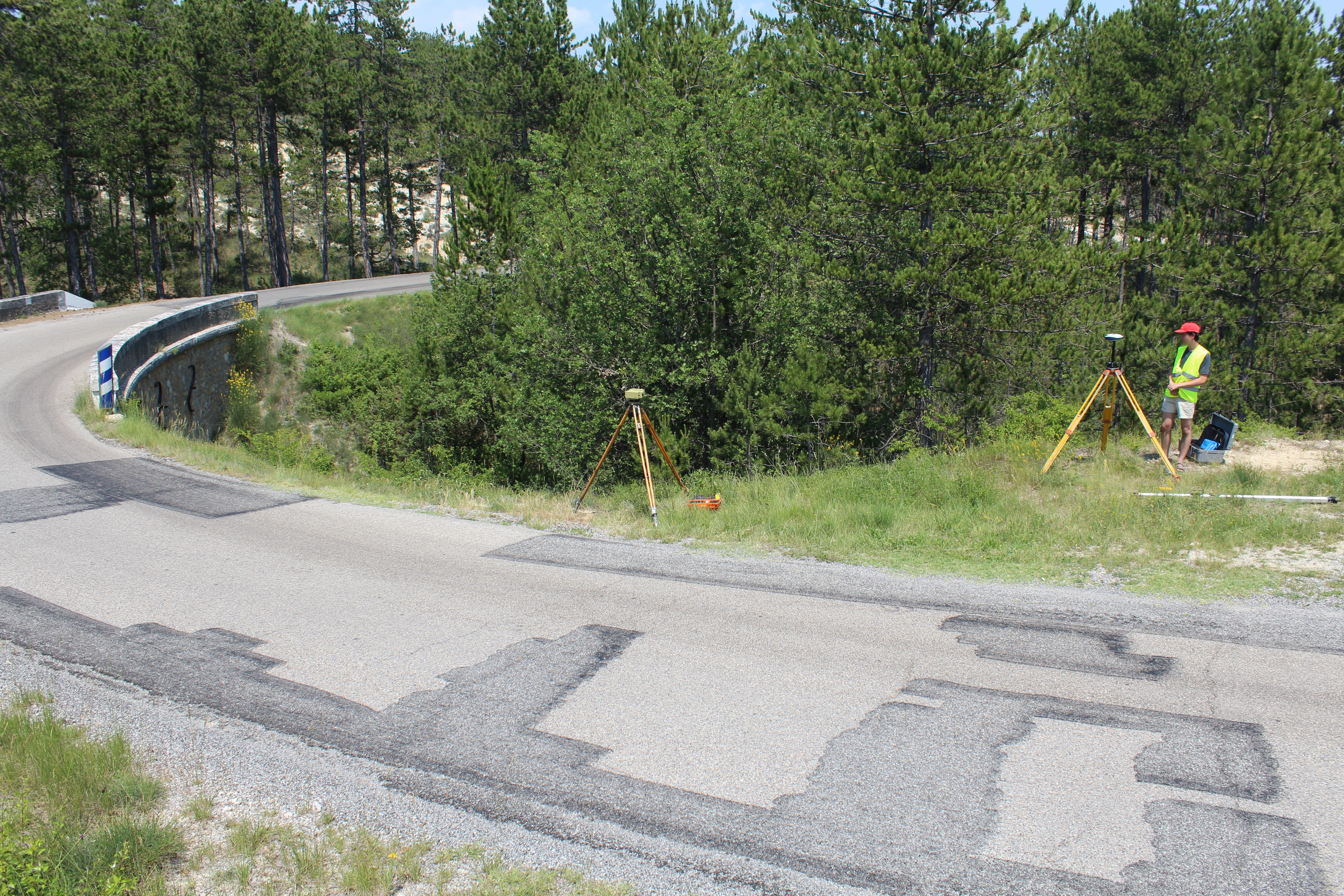 Stage Forcalquier géoïde de l'ENSG à Sigonce.